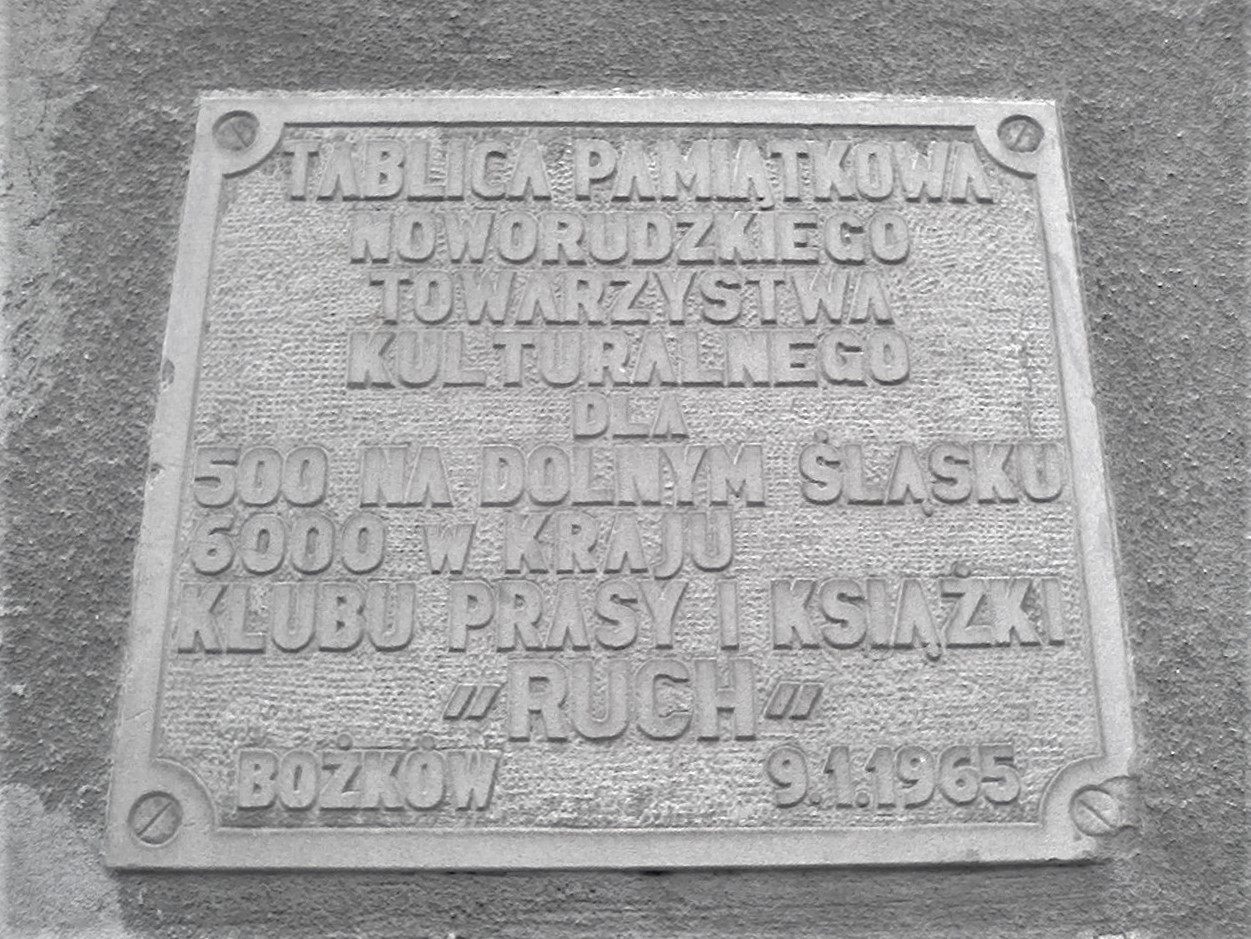 Bożków. Tablica pamiątkowa